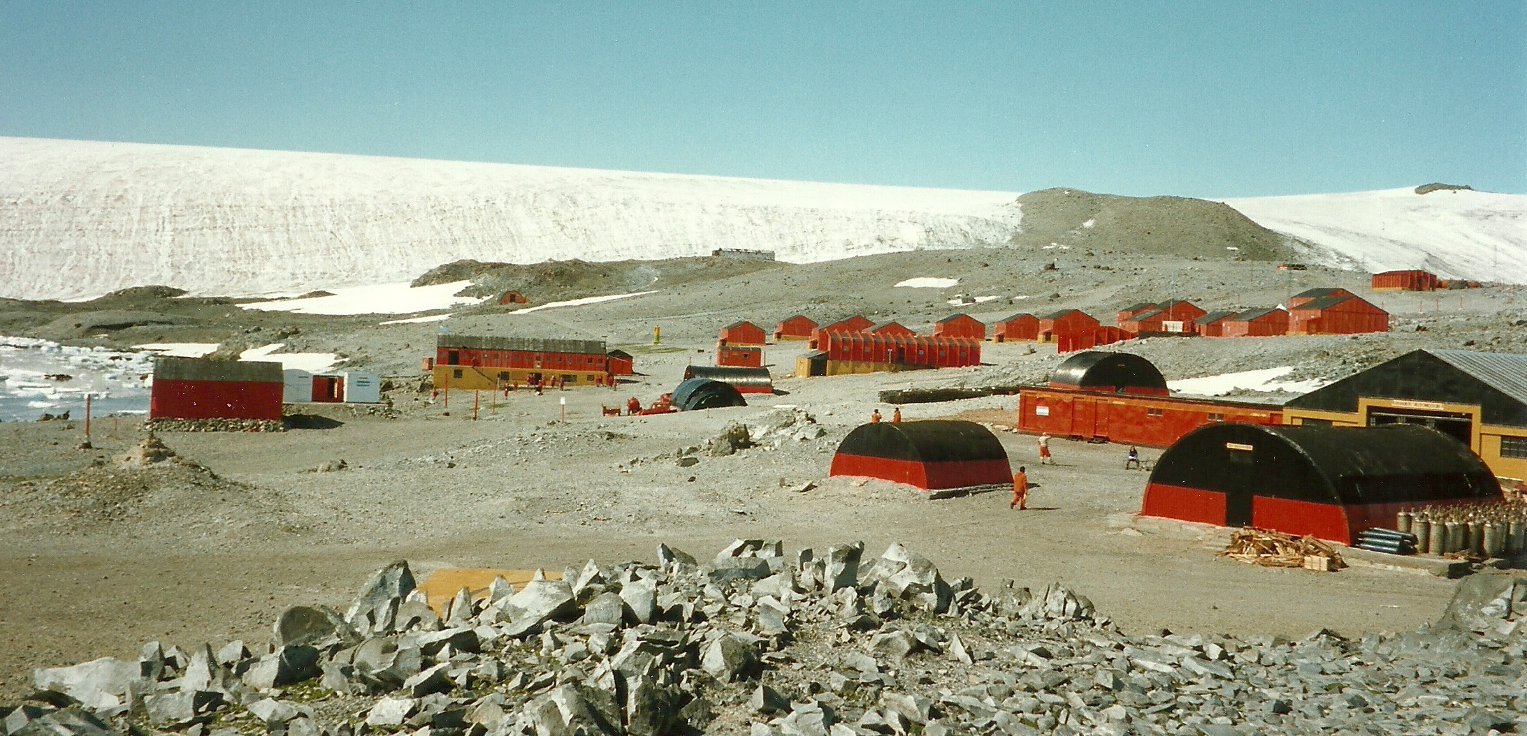 Hope Bay - argentinische Forschungsstation Esperanza - MS Columbus Caravelle